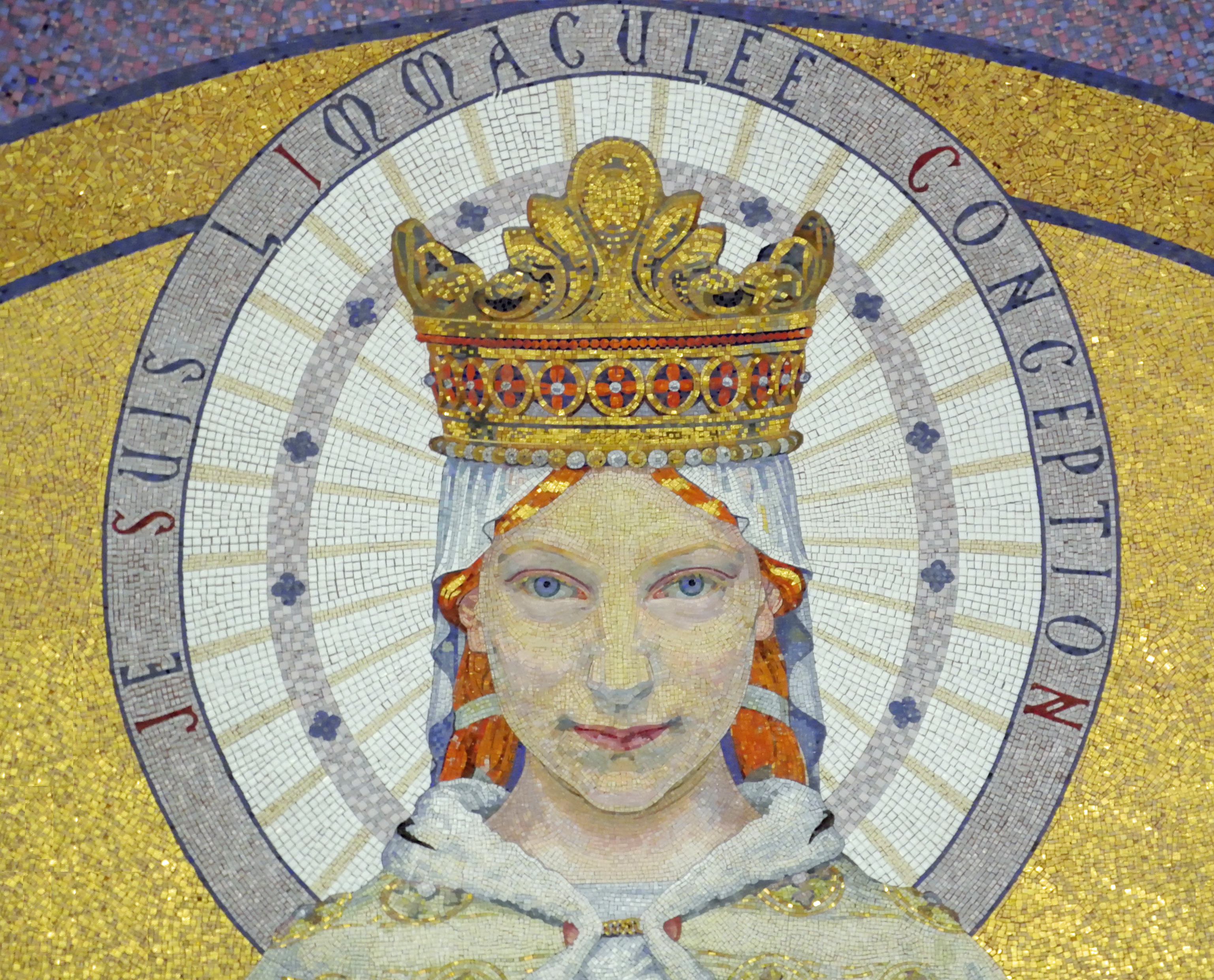 Illustration de la vierge en mosaïque, sur le dôme de la Basilique Notre-Dame du Rosaire de Lourdes. On est troublé par le regard de cette illustration.